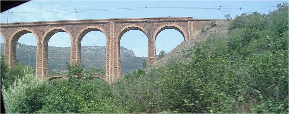 Pont a la vila de Duesaigües, fotografia propia